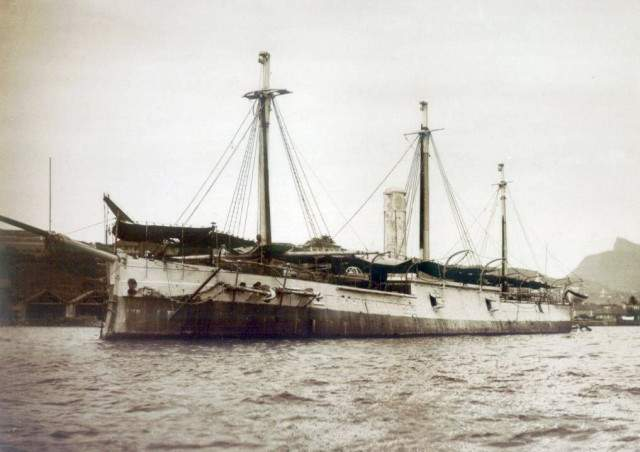 Encouraçado Sete de Setembro - Marinha do Brasil - Naval ship of Brazil.